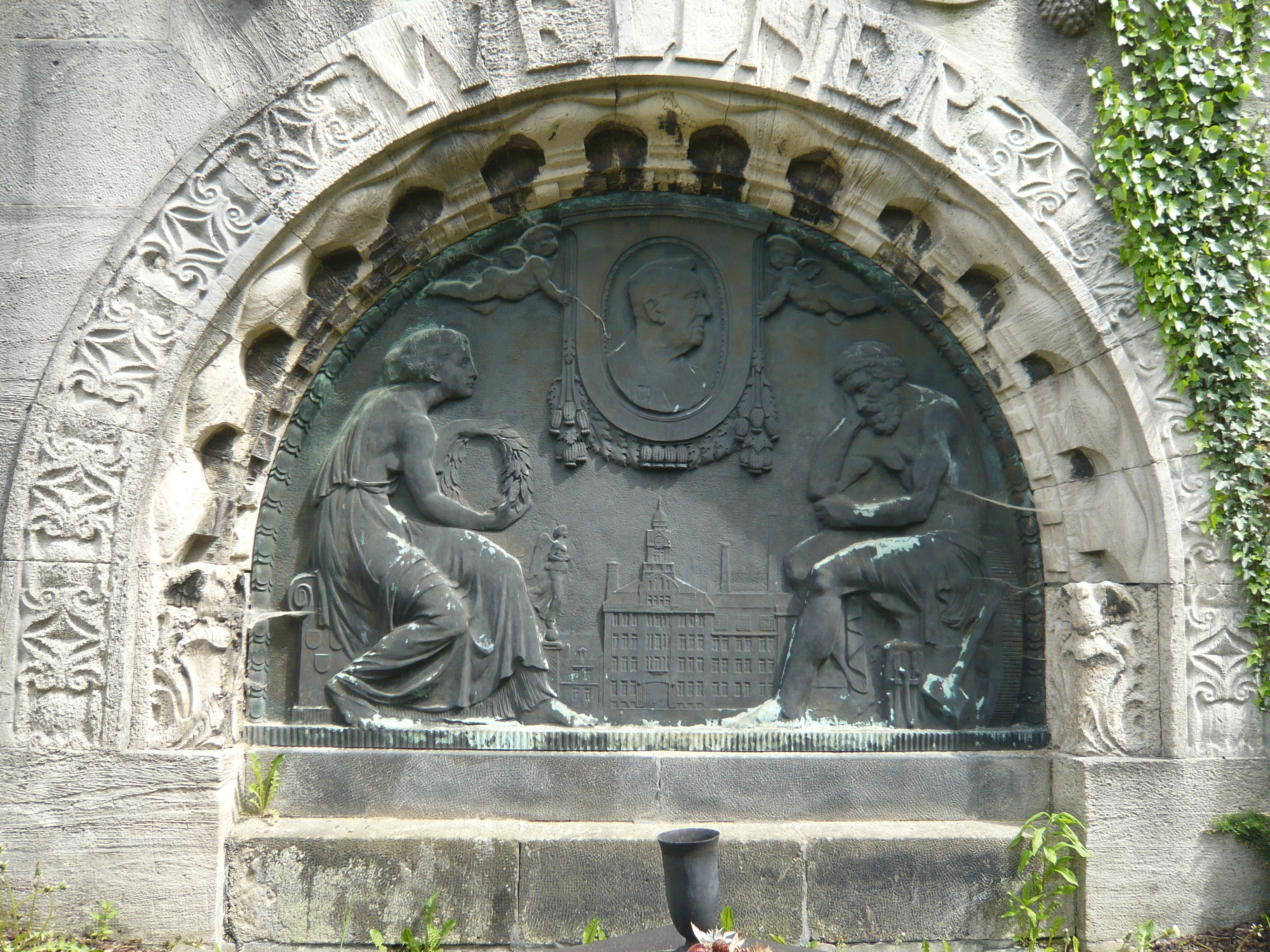 Stadt Aue, Grabmal Wellner auf dem Friedhof